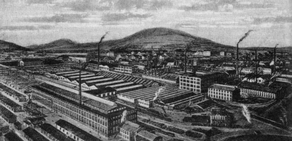 Kopřivnice - továrna na automobily a kočáry